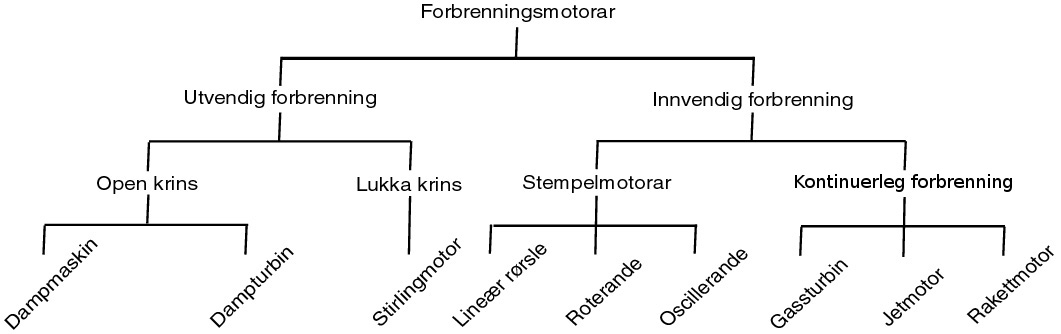 Klassifisering av forbrenningsmotorar. Eige verk.